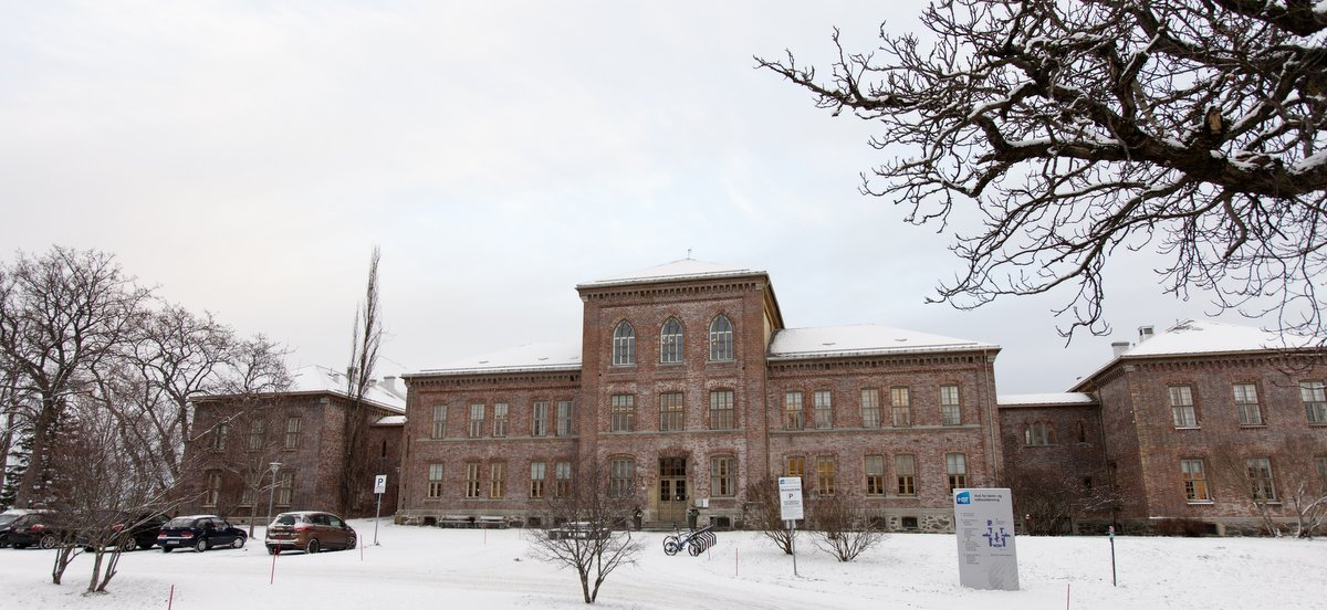 Bygningen der NTNU UB Rotvoll holder til